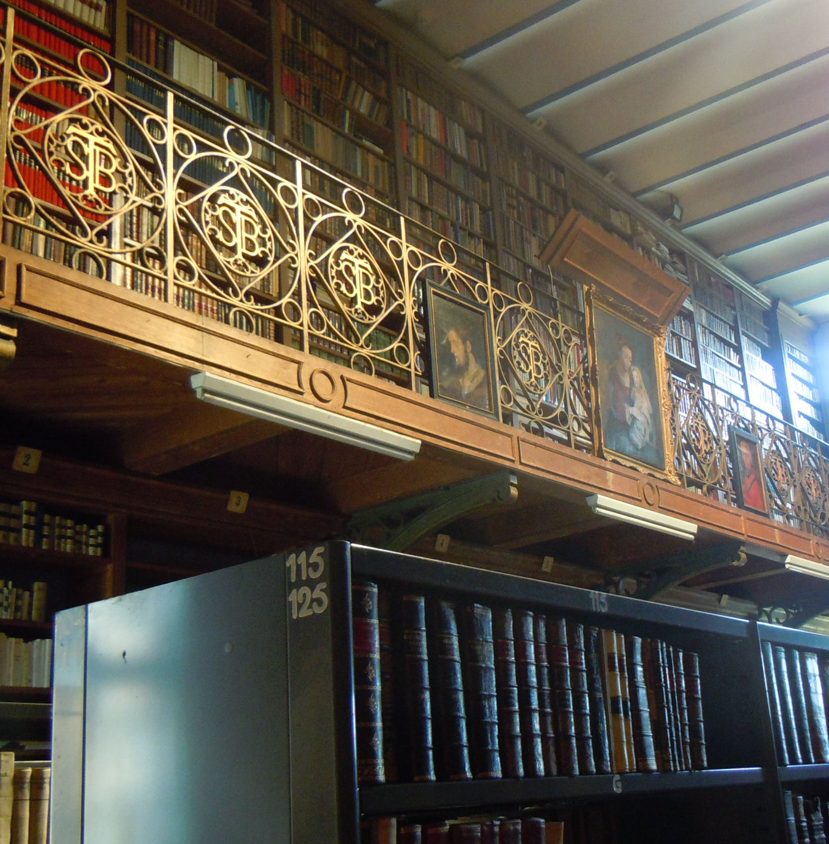 Bibliotheek